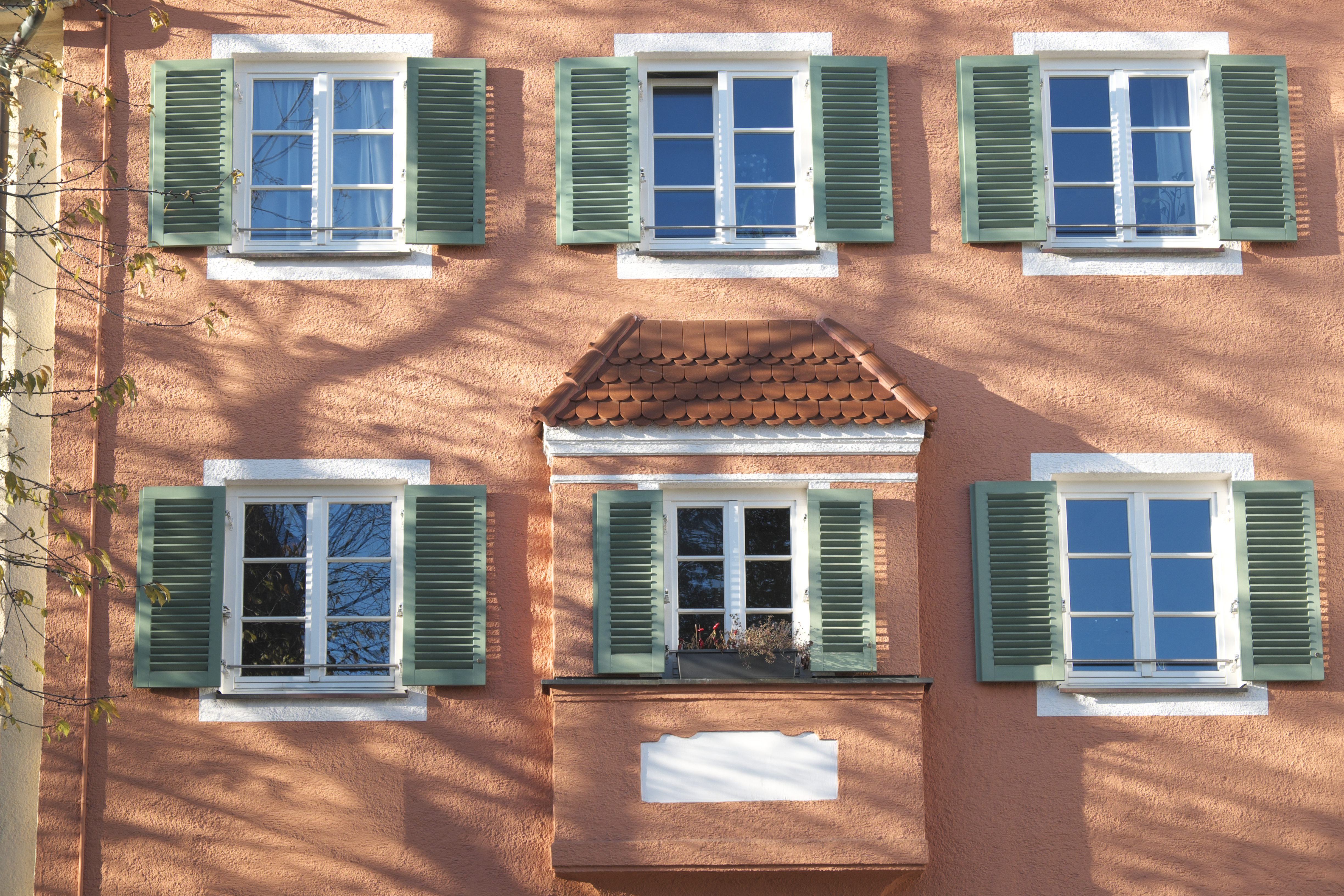 Arbeiterheim, Josef-Retzer-Straße 49/51/53/55, in Pasing im Stadtbezirk Pasing-Obermenzing in München (Bayern/Deutschland), 1920 bis 1925 von Ludwig Zeller (Nr. 49) und den Gebrüdern Ott erbaut